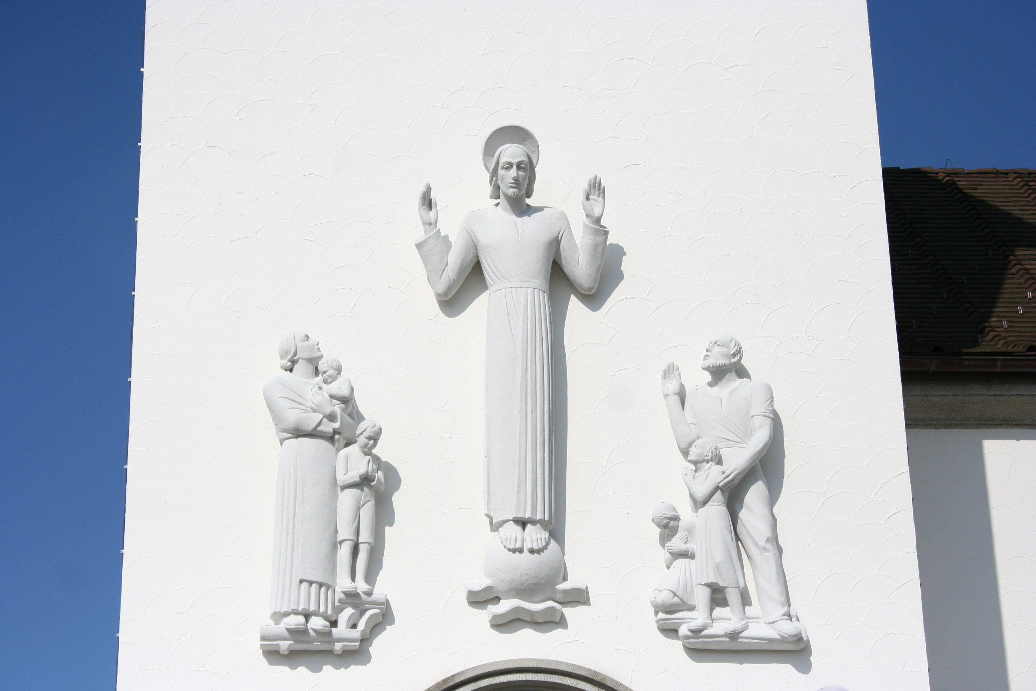 Römisch-katholische Pfarrkirche Herz Jesu Turbenthal, Aussenrelief